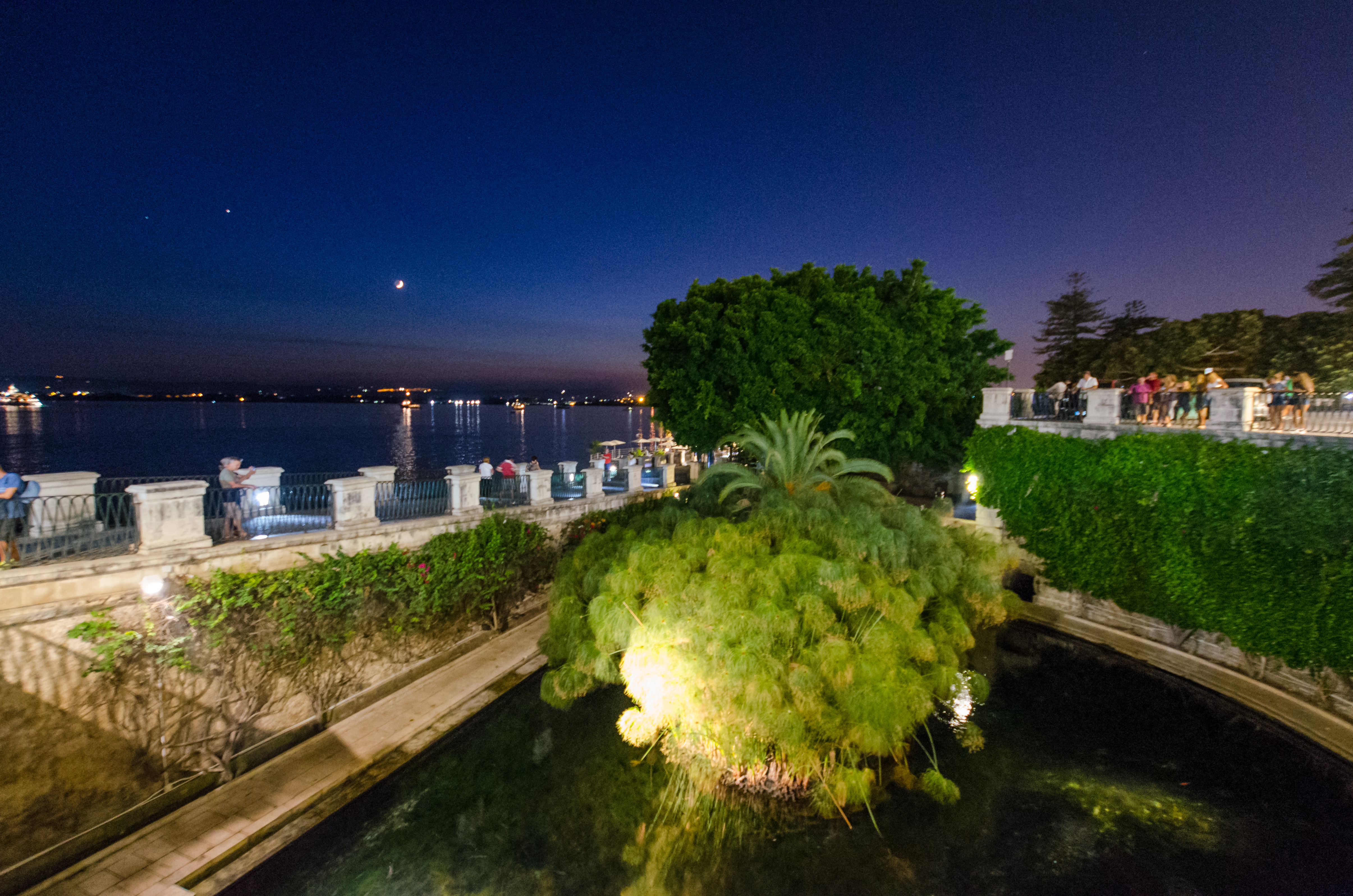 Fonte Aretusa This is a photo of a monument which is part of cultural heritage of Italy.